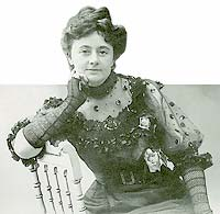 Autor: Милан Јовановић - фотограф - (1863-1944), slika nastala 1896. godine, Izvor: mada je ima na mnogo sajtova i nije zaštićena